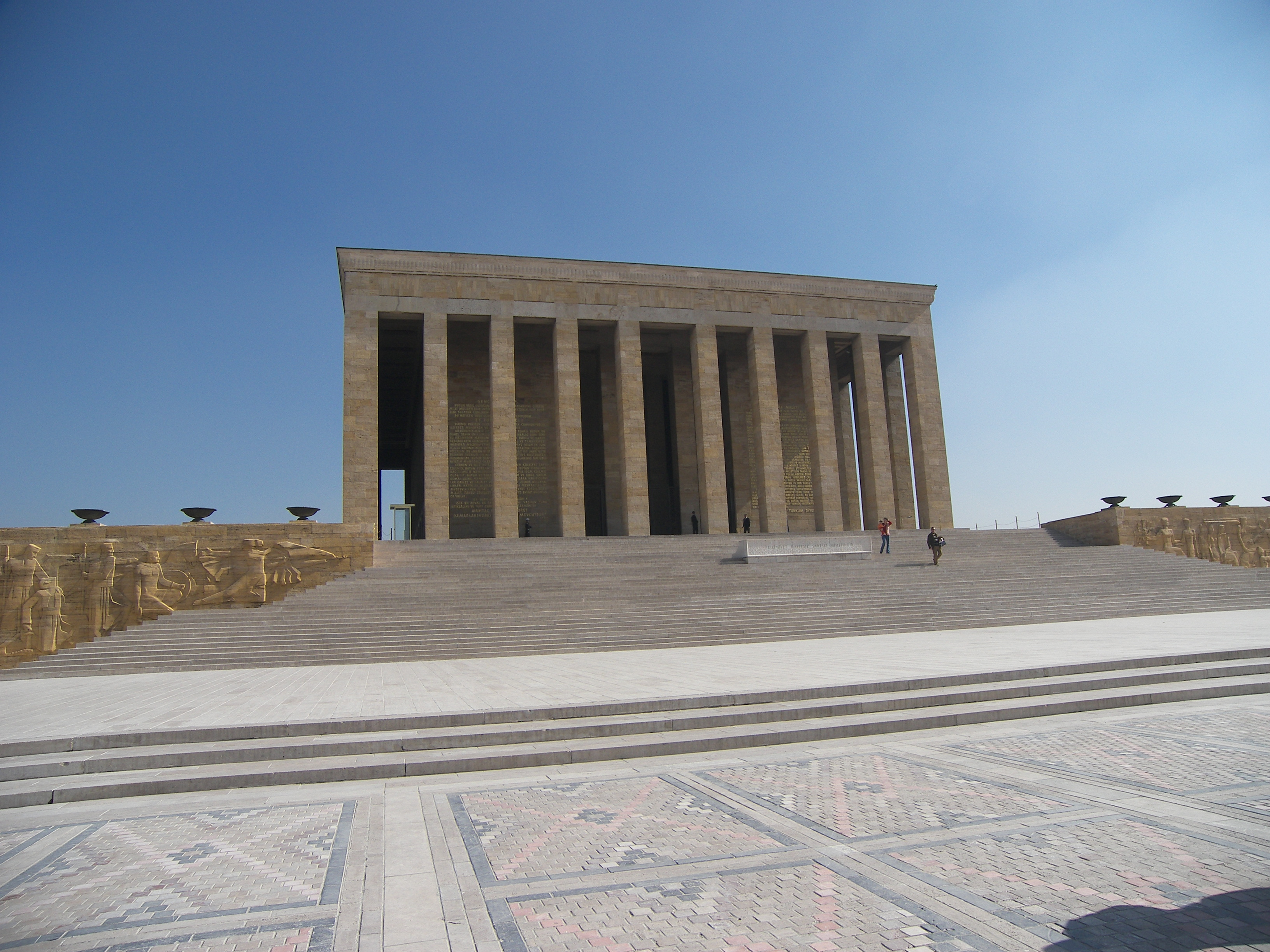 Anitkabir-Ataturk's Mausoleum